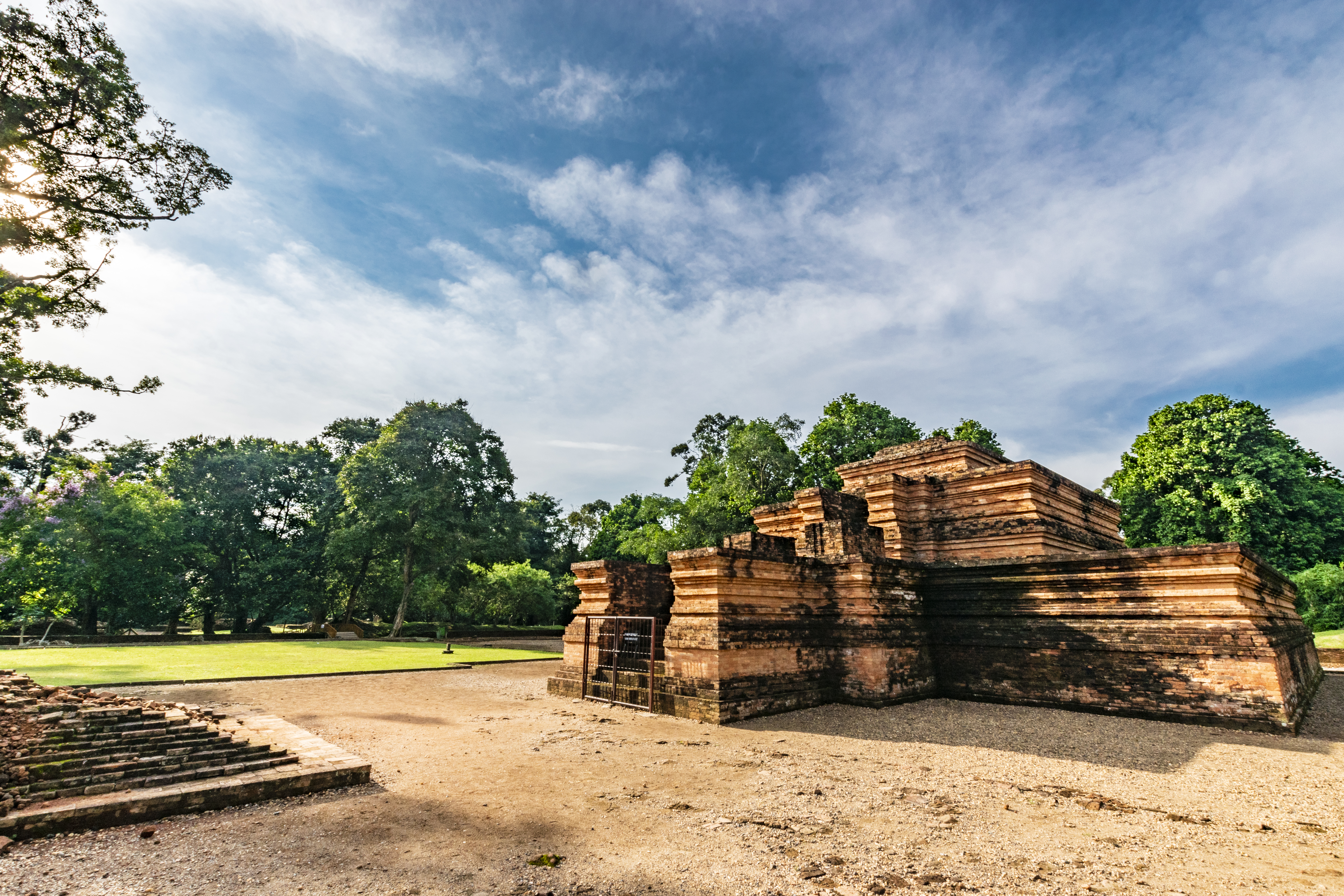 Candi Muaro Jambi adalah sebuah kompleks percandian agama Hindu-Buddha terluas di asia tenggara, dengan luas 3981 hektar. yang kemungkinan besar merupakan peninggalan Kerajaan Sriwijaya dan Kerajaan Melayu.